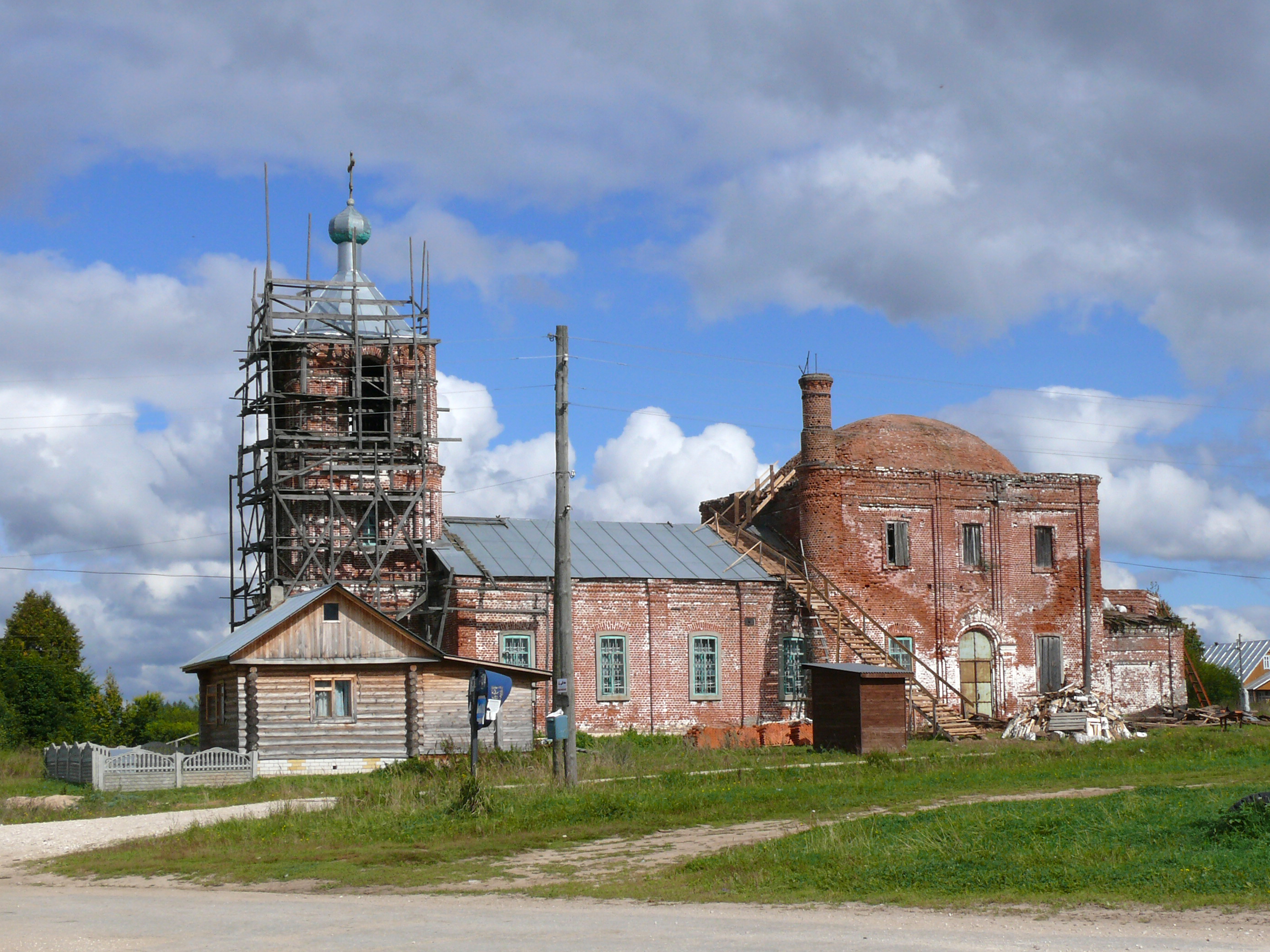 Ильинская церковь: улица Центральная, 22, Тынцы, Камешковский район, Владимирская область